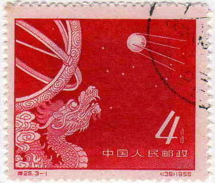 中国が発行したスプートニク衛星を描く切手